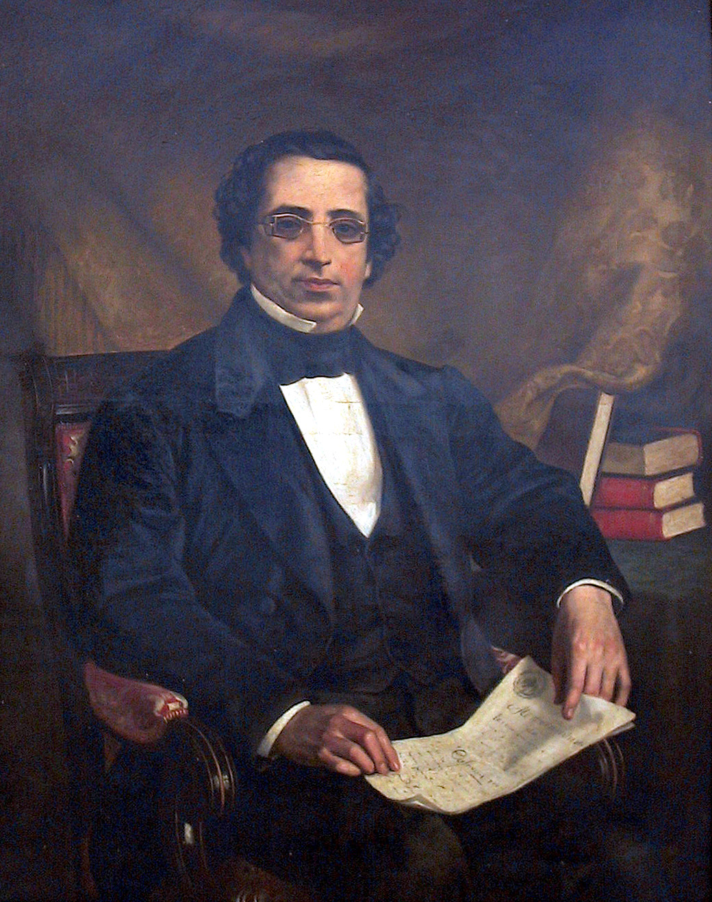 Retrato de José María Lafragua, s/a., siglo XIX, ubicado en la Dirección de la Biblioteca Histórica José María Lafragua, BUAP